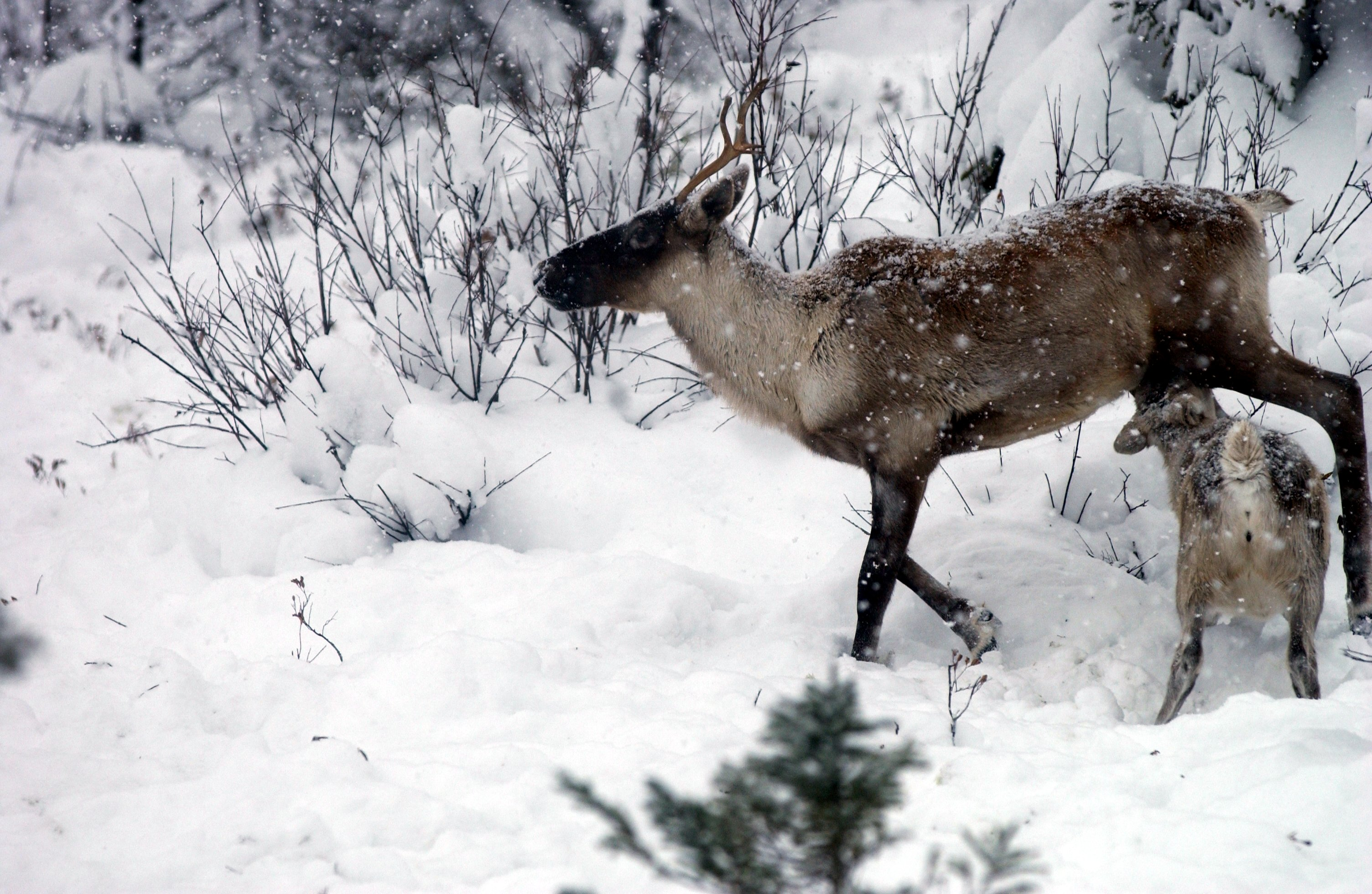 Temps neigeux et moment de pause pour la harde.